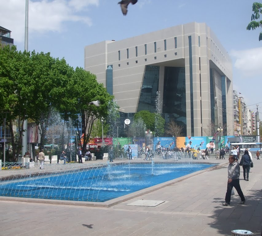 Kızılay Meydanı (2013).